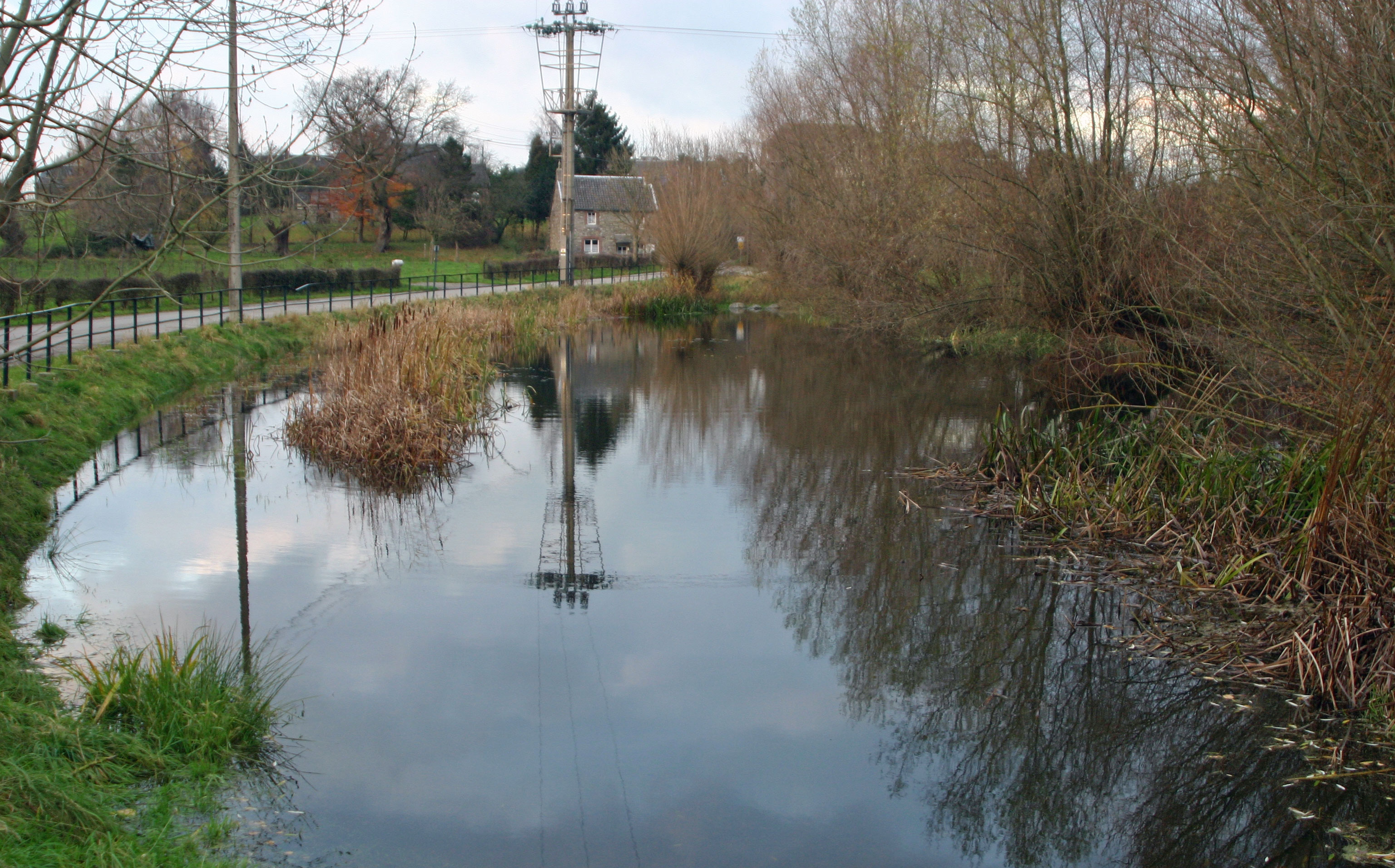 Geschützte Weier mat Kappweiden a Lëtschen zu Hansez an der Provënz Léck. Kategorie:Weieren Hansez